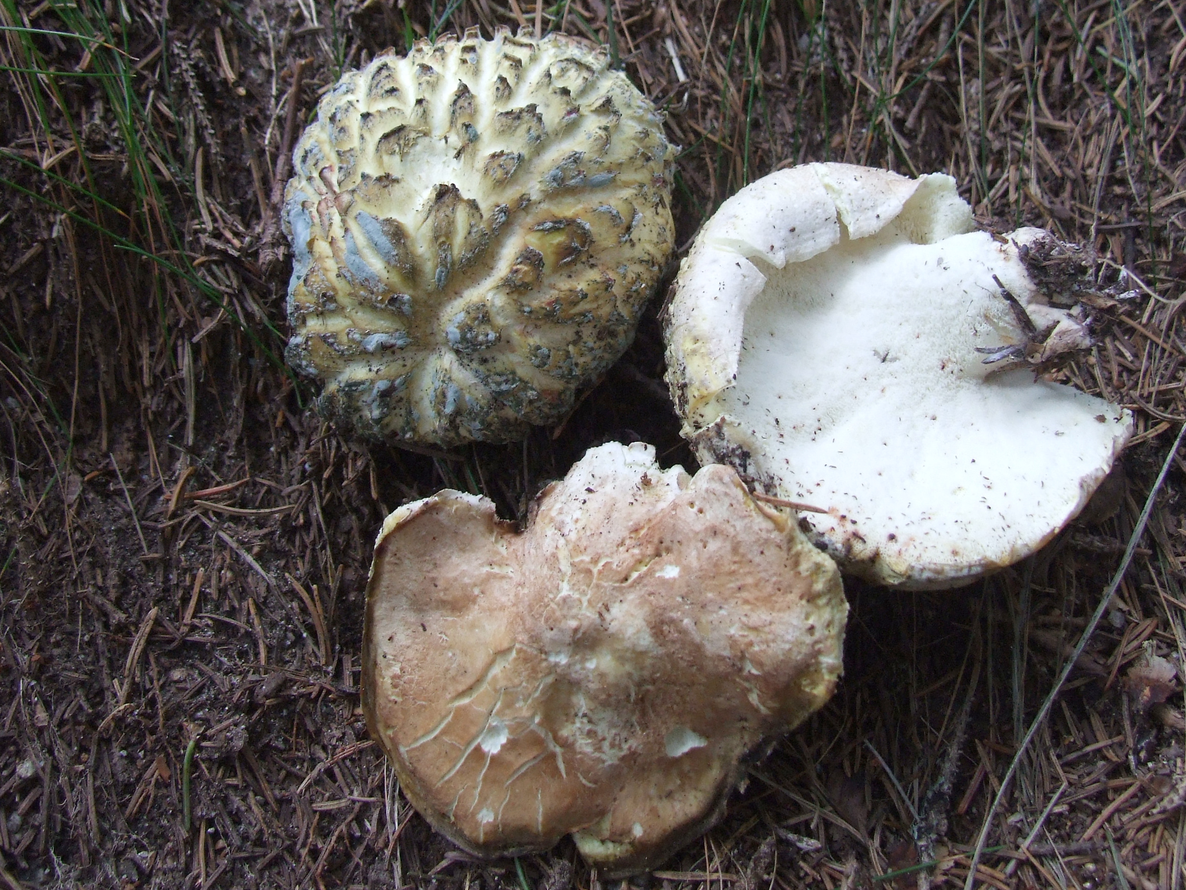 Albatrellus ovinus